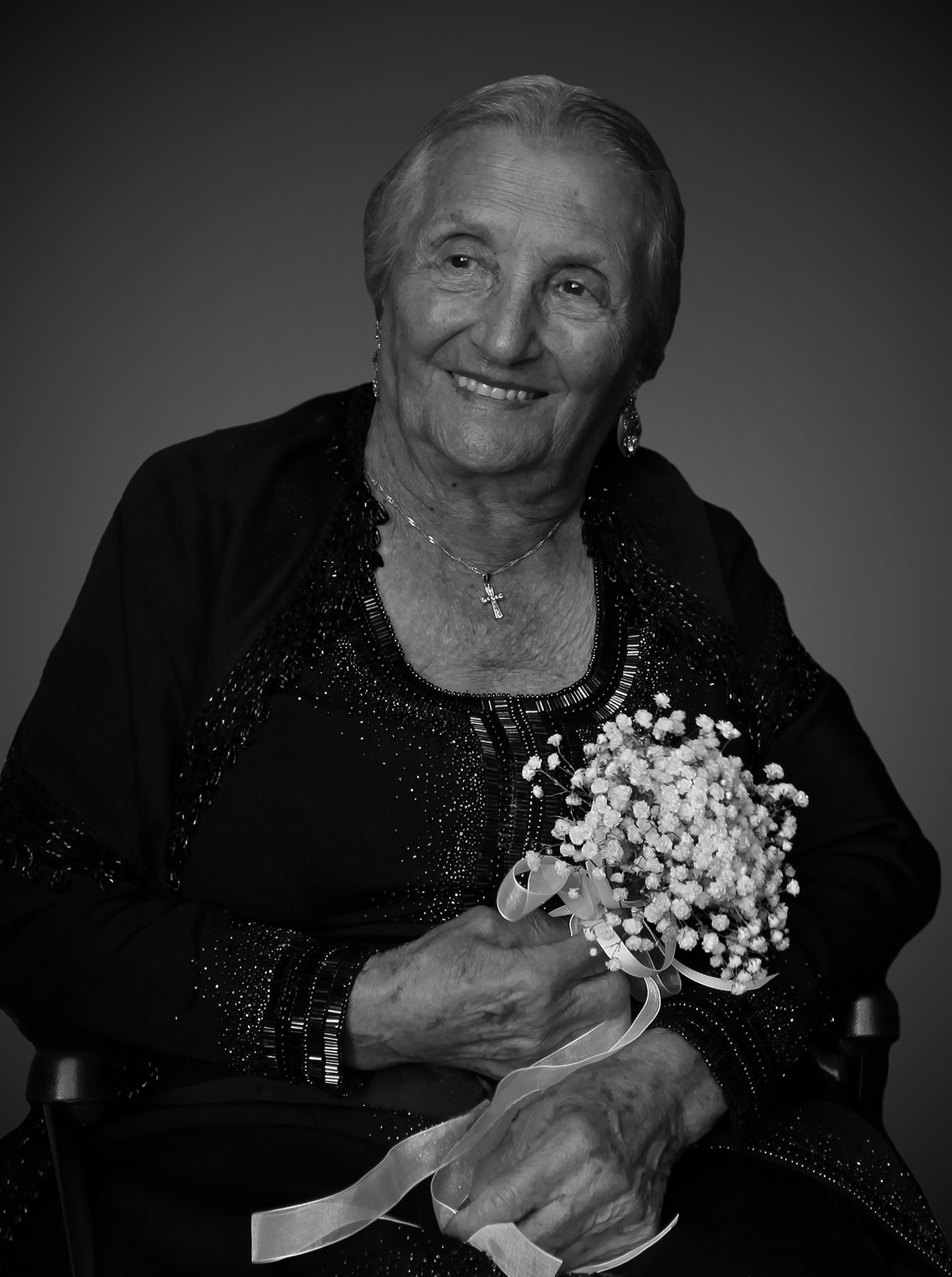 Photographie de madame Rosa Bouglione Veuve de Joseph Bouglione Cirque d'Hiver de Paris